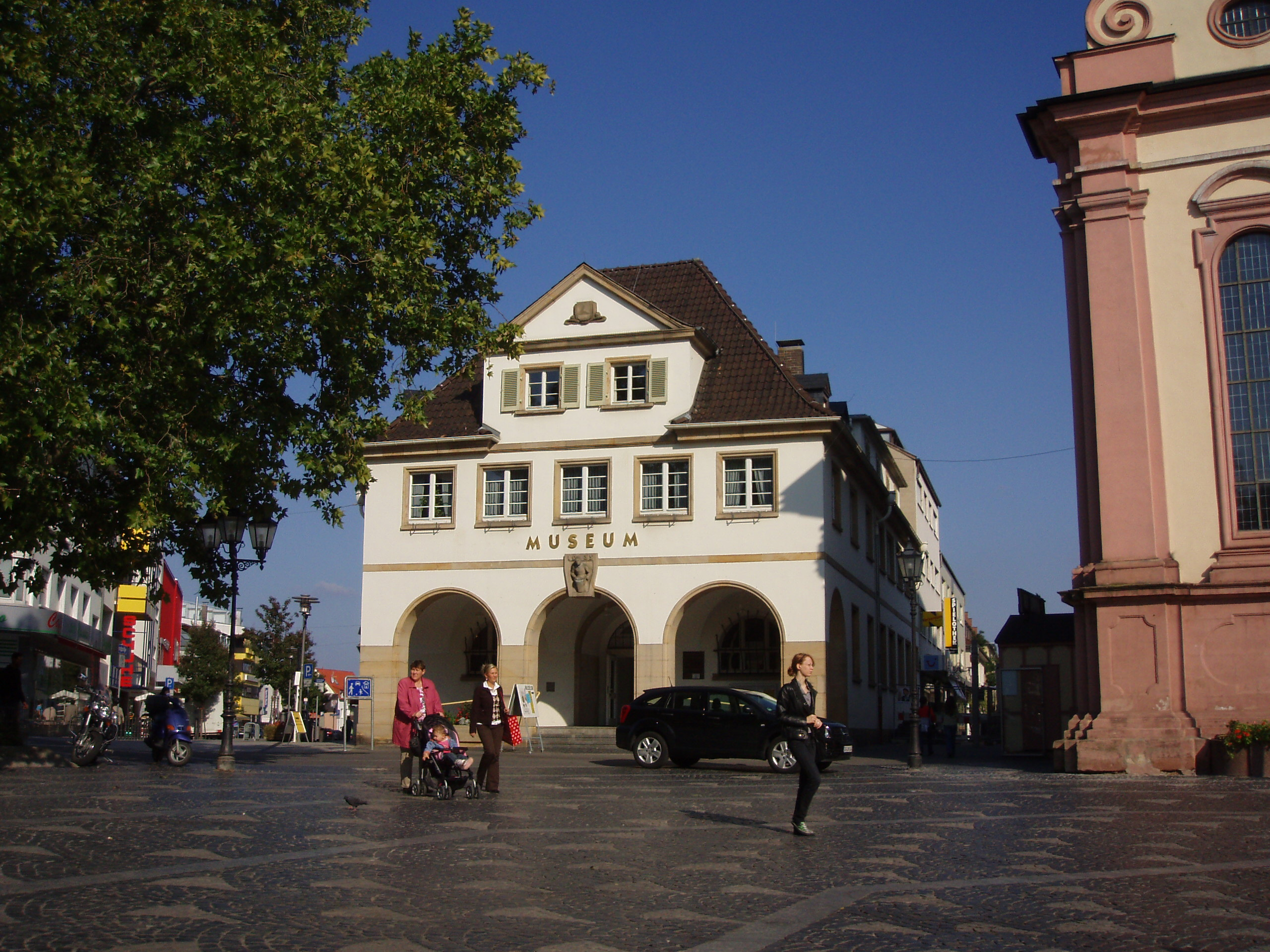 Erkenbertmuseum Frankenthal